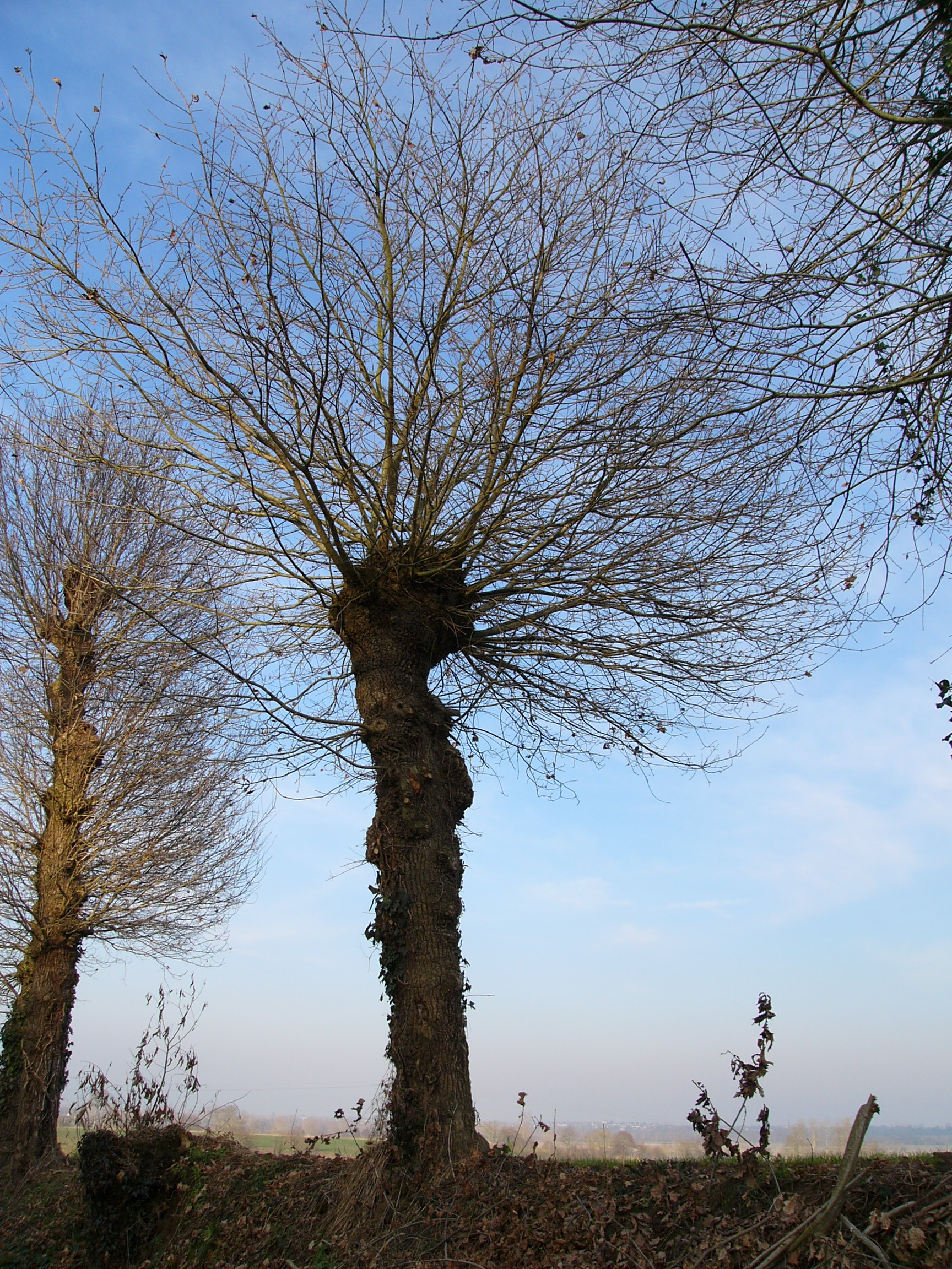 Un chêne têtard du bocage breton.